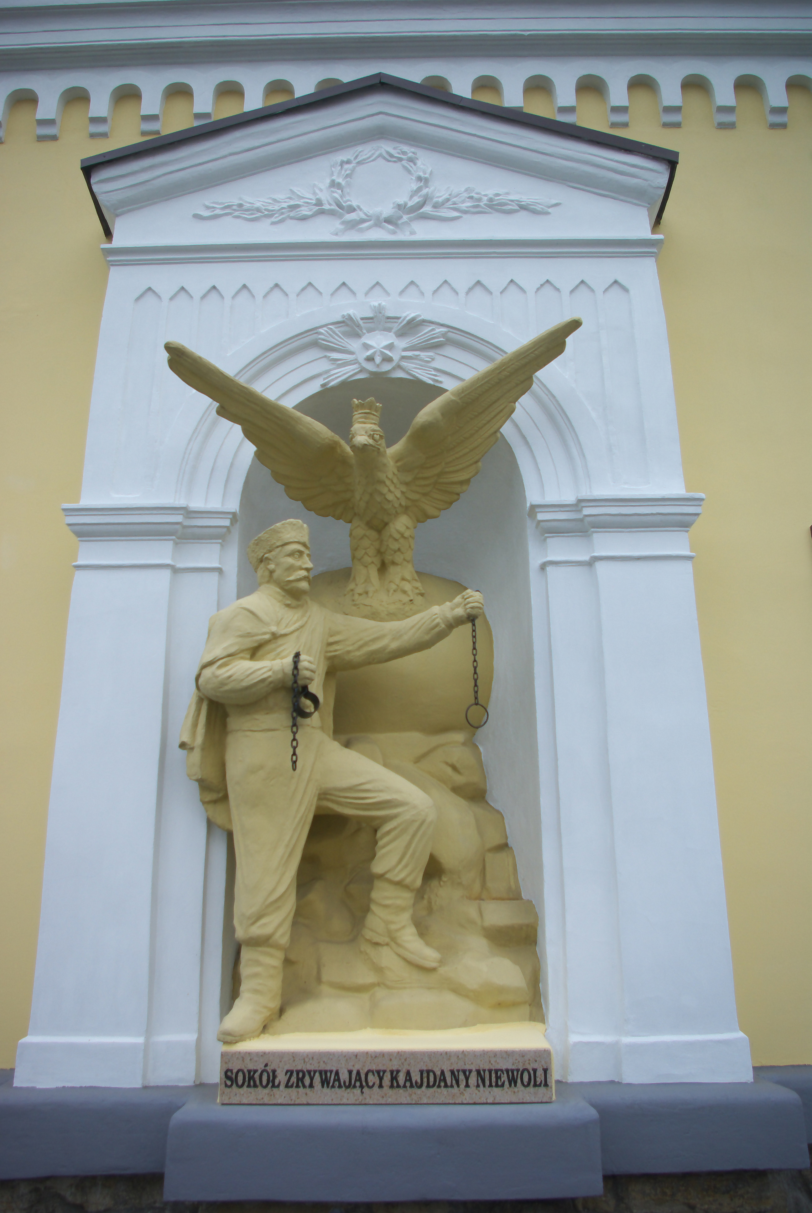 Elewacja wschodnia gmachu Polskiego Towarzystwa Gimnastycznego „Sokół” w Sanoku po uroczystościach 125-lecia w czerwcu 2014. Rzeźba sokoła zrywającego kajdany niewoli